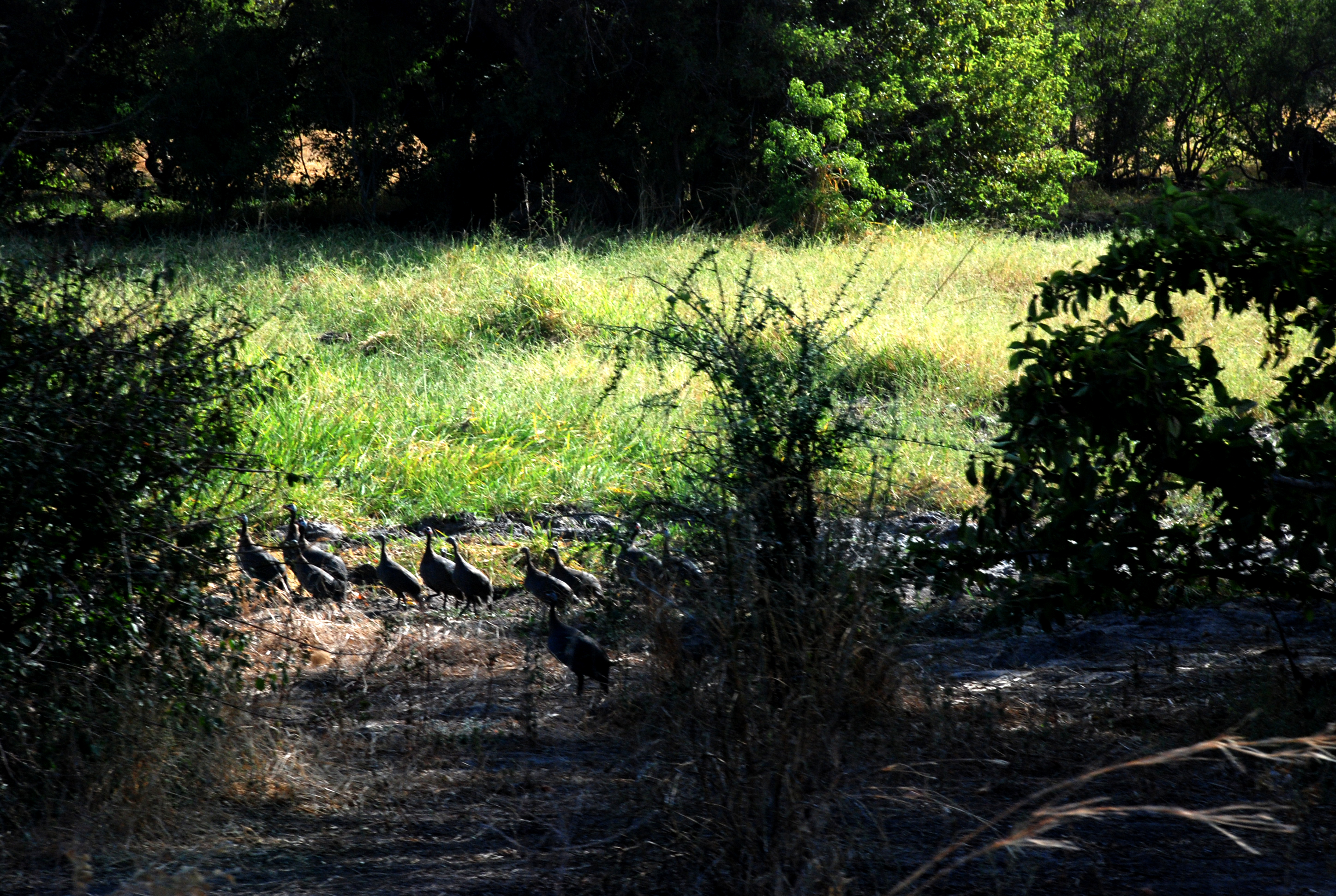 Parc de Waza dans le nord Cameroun